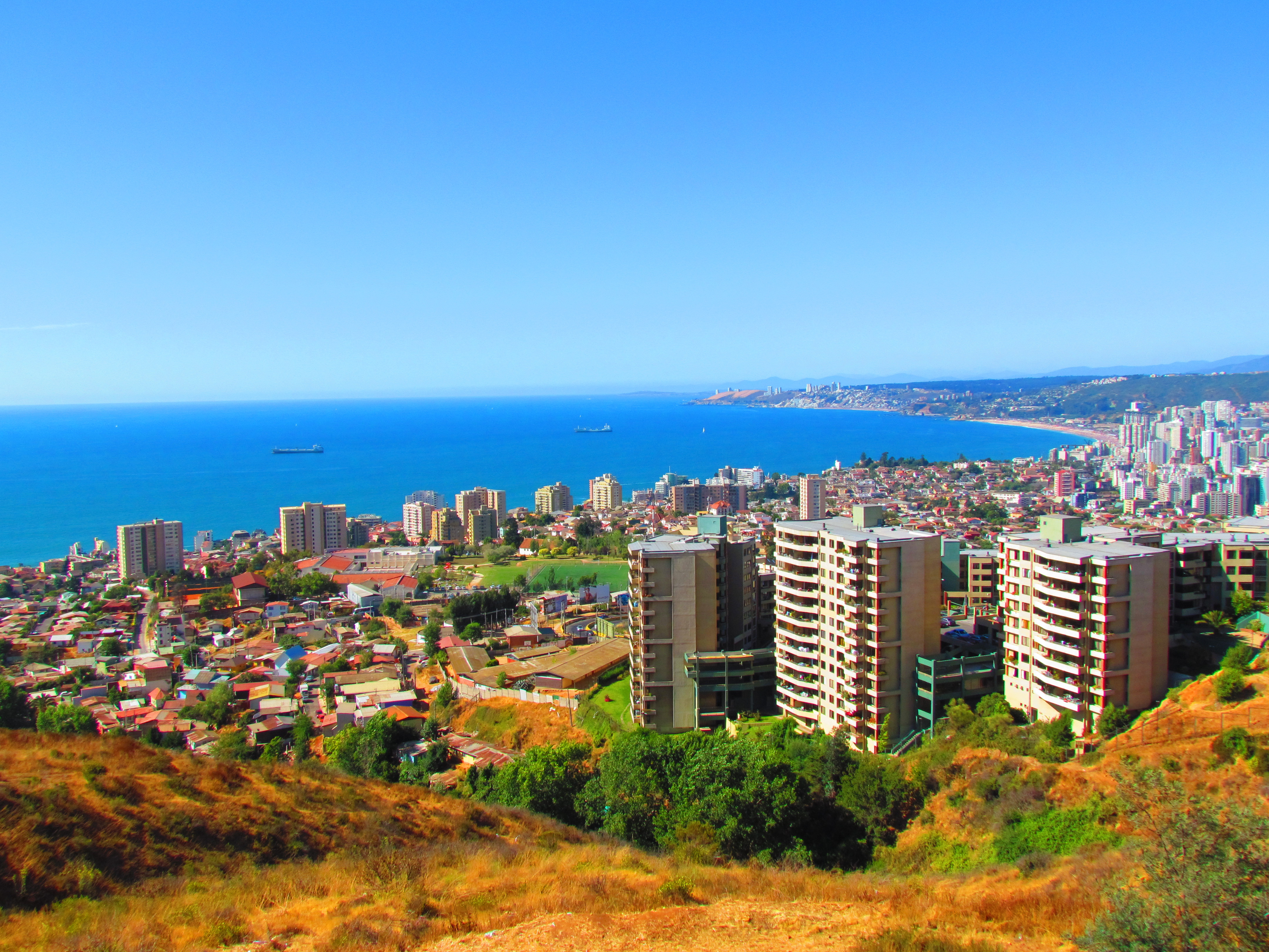 Mirador Pablo Neruda, Agua Santa, Viña del Mar.